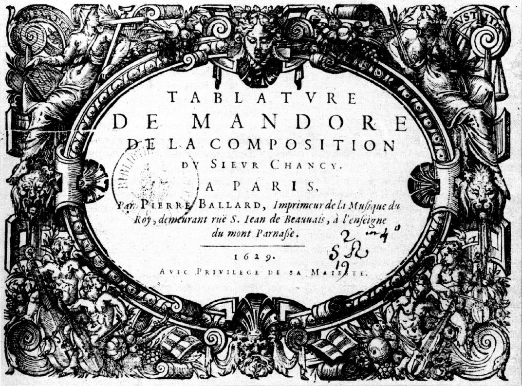 Title page of François de Chancy Tablature de Mandore, 1629.